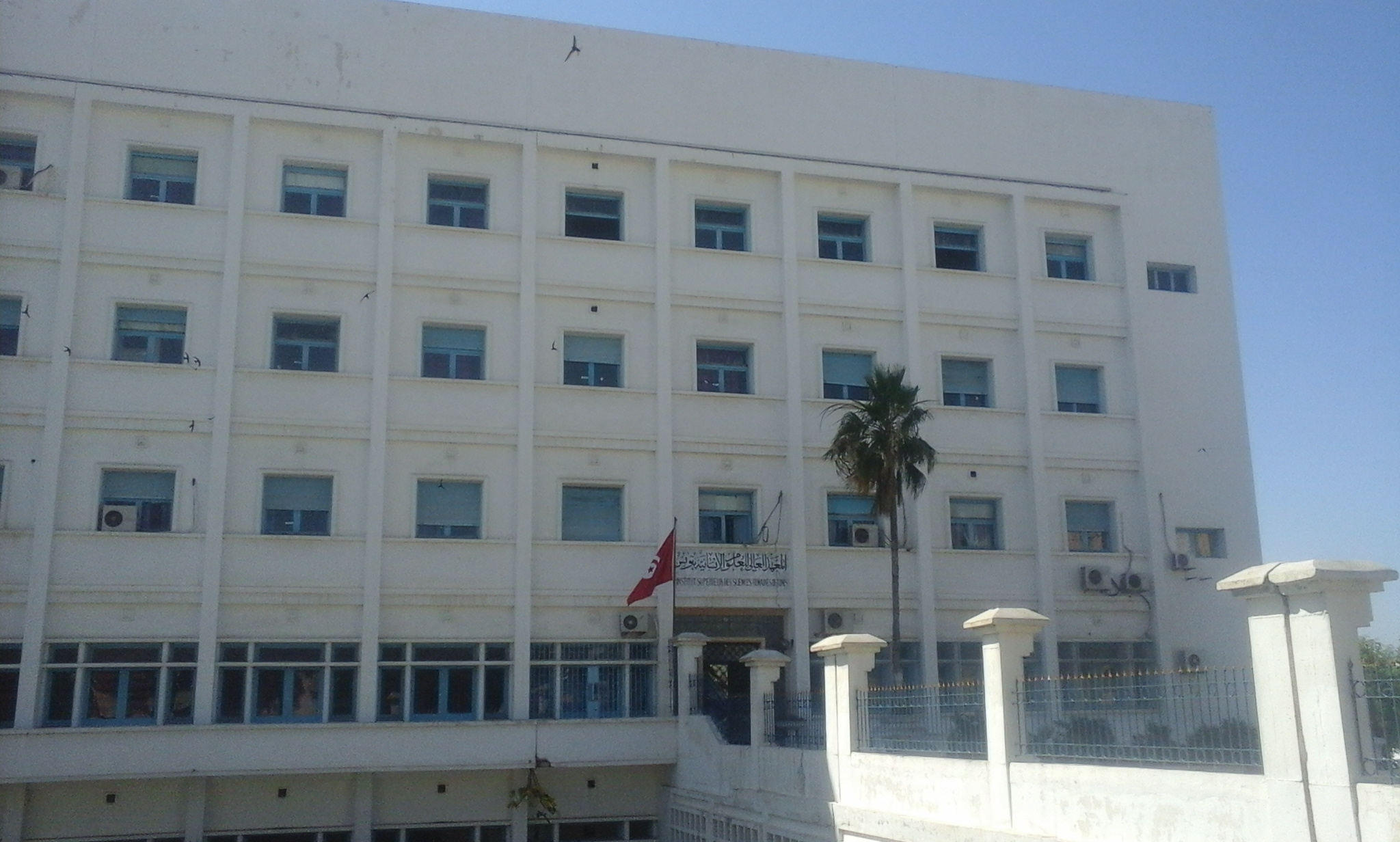 مقر الحي الزيتوني سابقا/ المعهد العالي للعلوم الإنسانية ابن شرف تونس